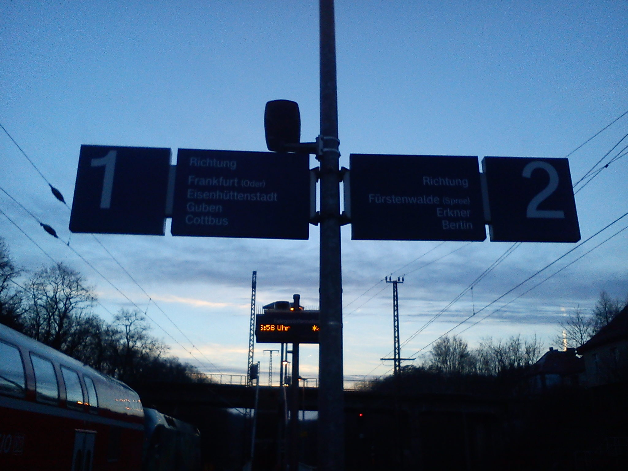 Ein Bild vom Bahnhof Frankfurt (Oder)-Rosengarten.